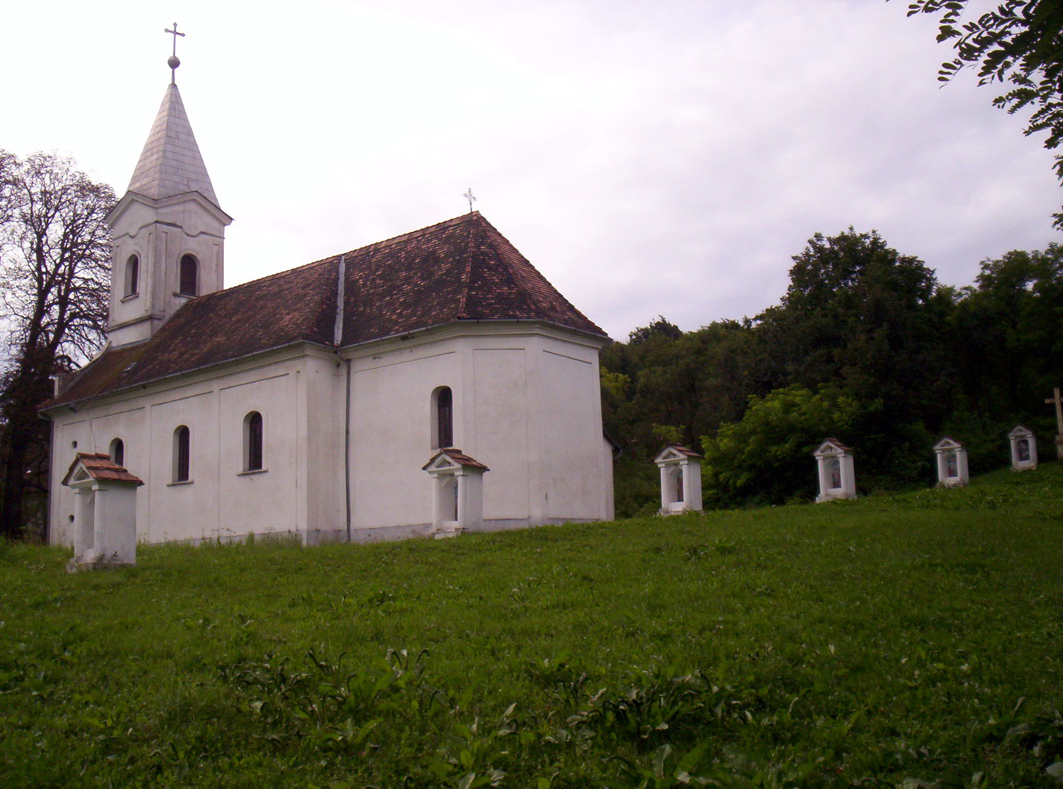 A Nagyboldogasszony tiszteletére szentelt római katolikus templom Grábócon. Épült 1765-ben, kibővítették 1795-ben – photo taken by uploader User:Csanády in 2006.